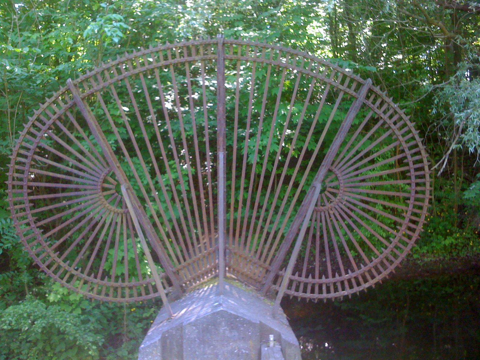 Billede af jerngitter på batardeau på Vestvolden (del af Københavns befæstning).